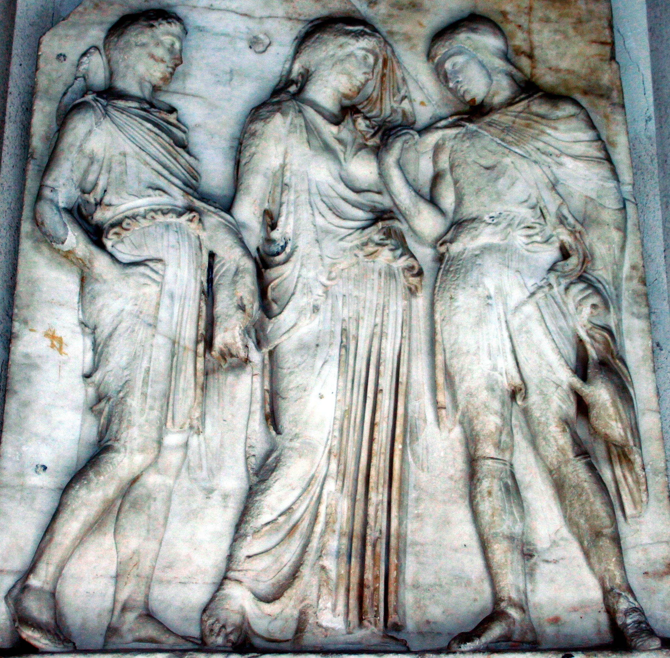 Bassorilievo in marmo che rappresenta Ermes, Euridice e Orfeo, copia romana di età augustea, da originale greco del V secolo a.C. attribuile all'allievo di Fidia, Alkamenes; conservato al Museo archeologico nazionale di Napoli.